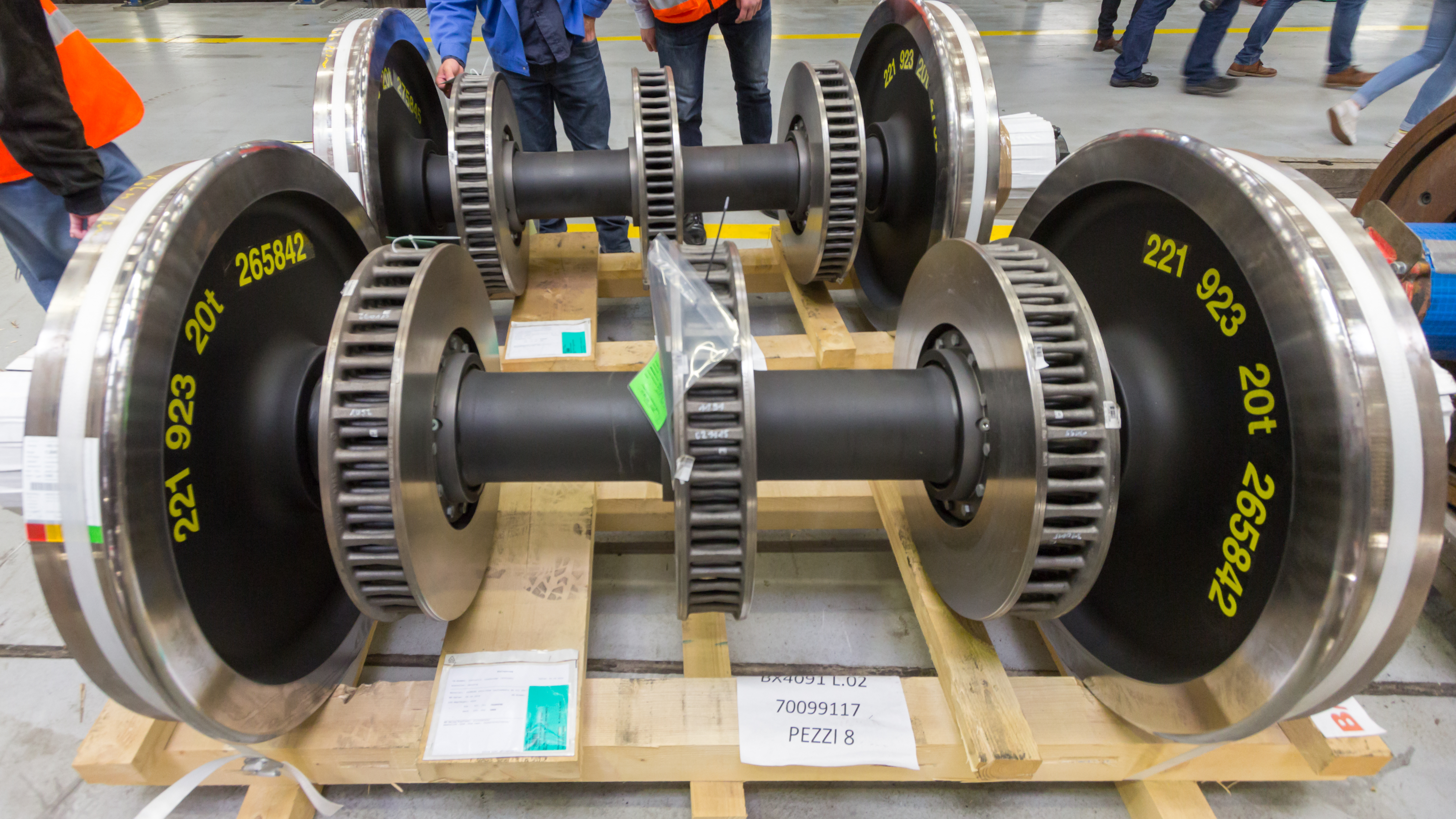 Pressetermin im ICE-Betriebswerk Köln. Im Rahmen des Programm RESET erhalten alle ICE eine Spezialbehandlung. An den Wagen werden dabei alle Funktionsstörungen an der Bordküche, an Klimaanlagen, am Antrieb und in den WCs behoben. Es werden intensive Reinigungen durchgeführt und ein Teil der Sitze getauscht. Foto: 2 neue/instandgesetzte Radsätze